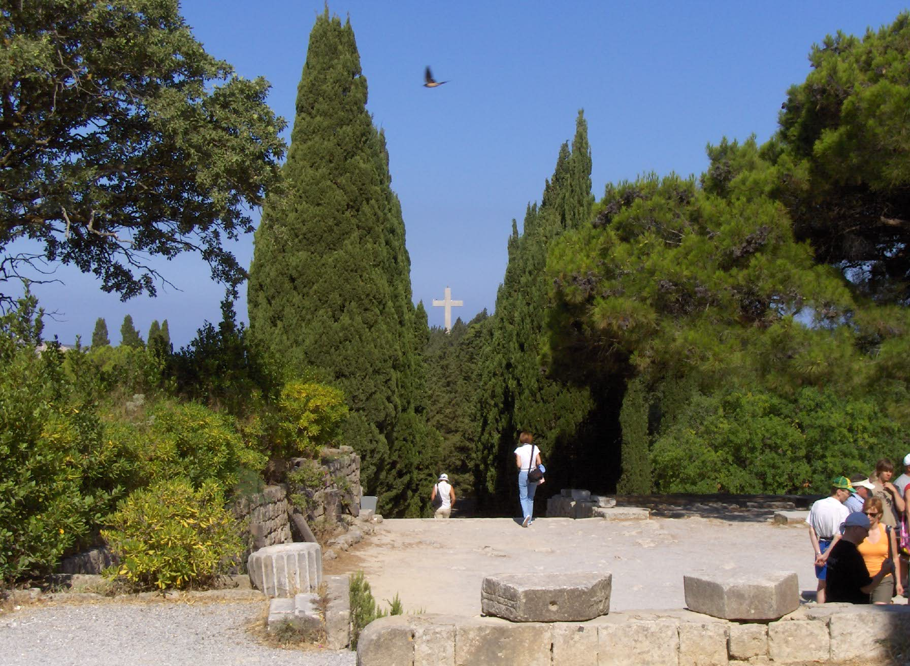 Wzgórze Filerimos, Rodos (Grecja)